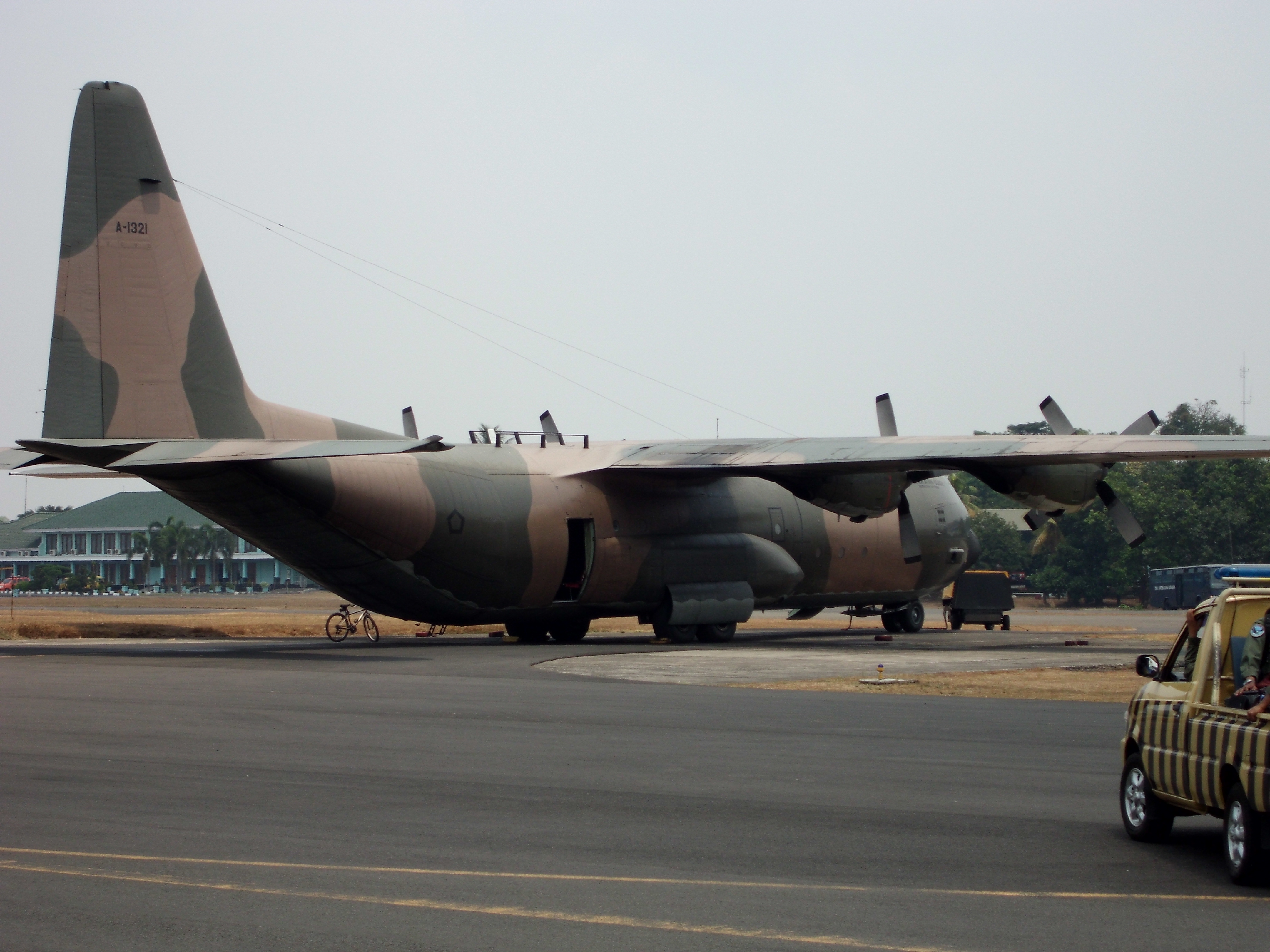 Bandara Halim Perdana Kusuma